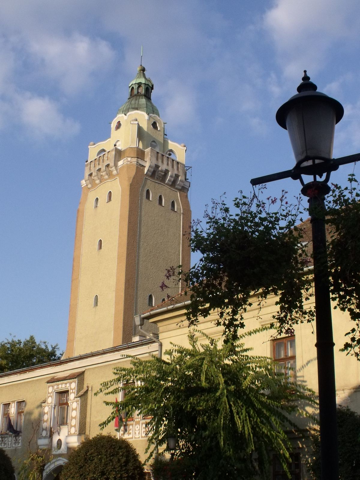 Városháza (Kiskunhalas, Hősök tere 1.) This is a photo of a monument in Hungary, Identifier: 2296